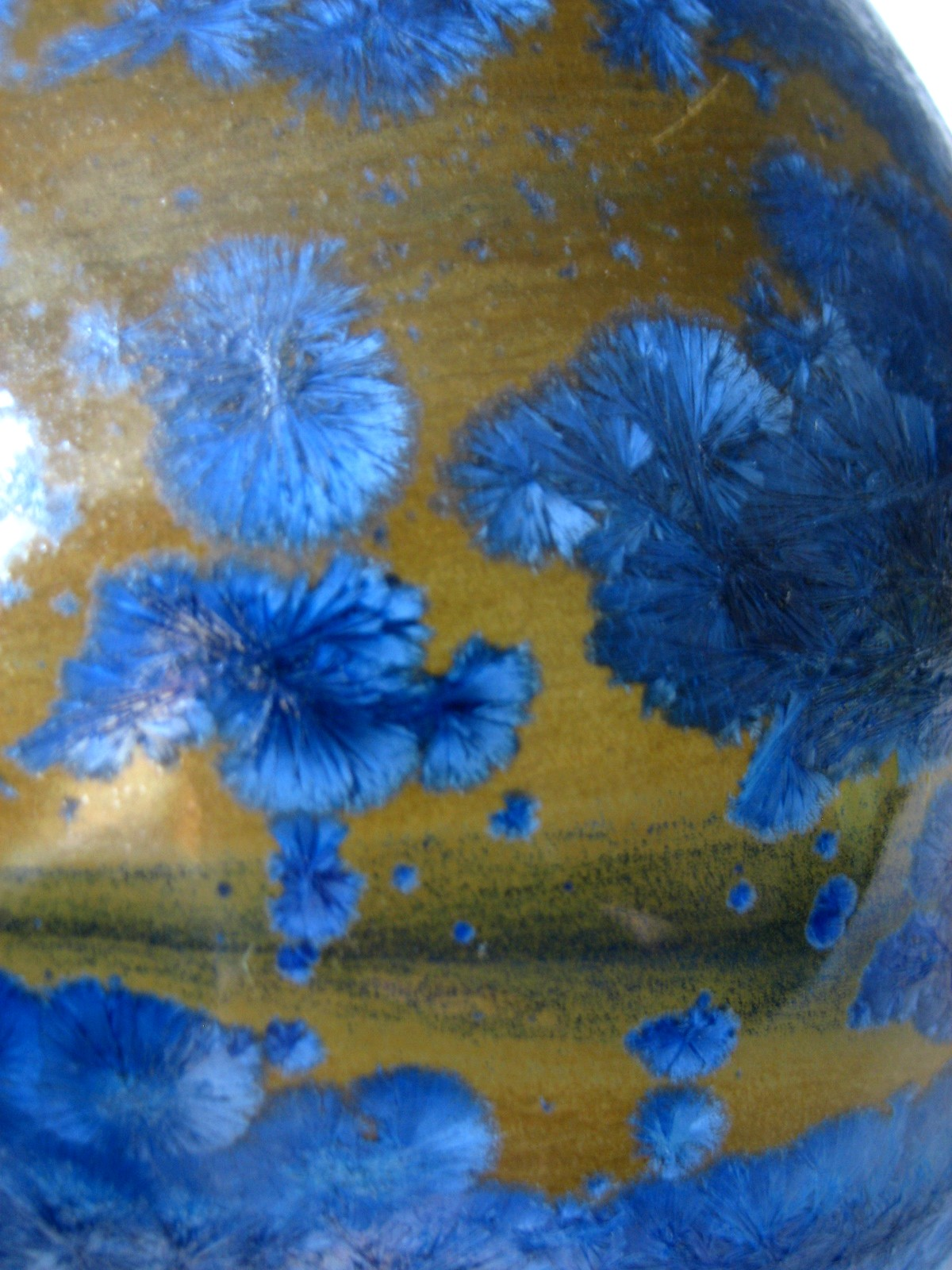 Grès de Pierrefonds, vers 1930, détail de l'émaiilage à cristallisations